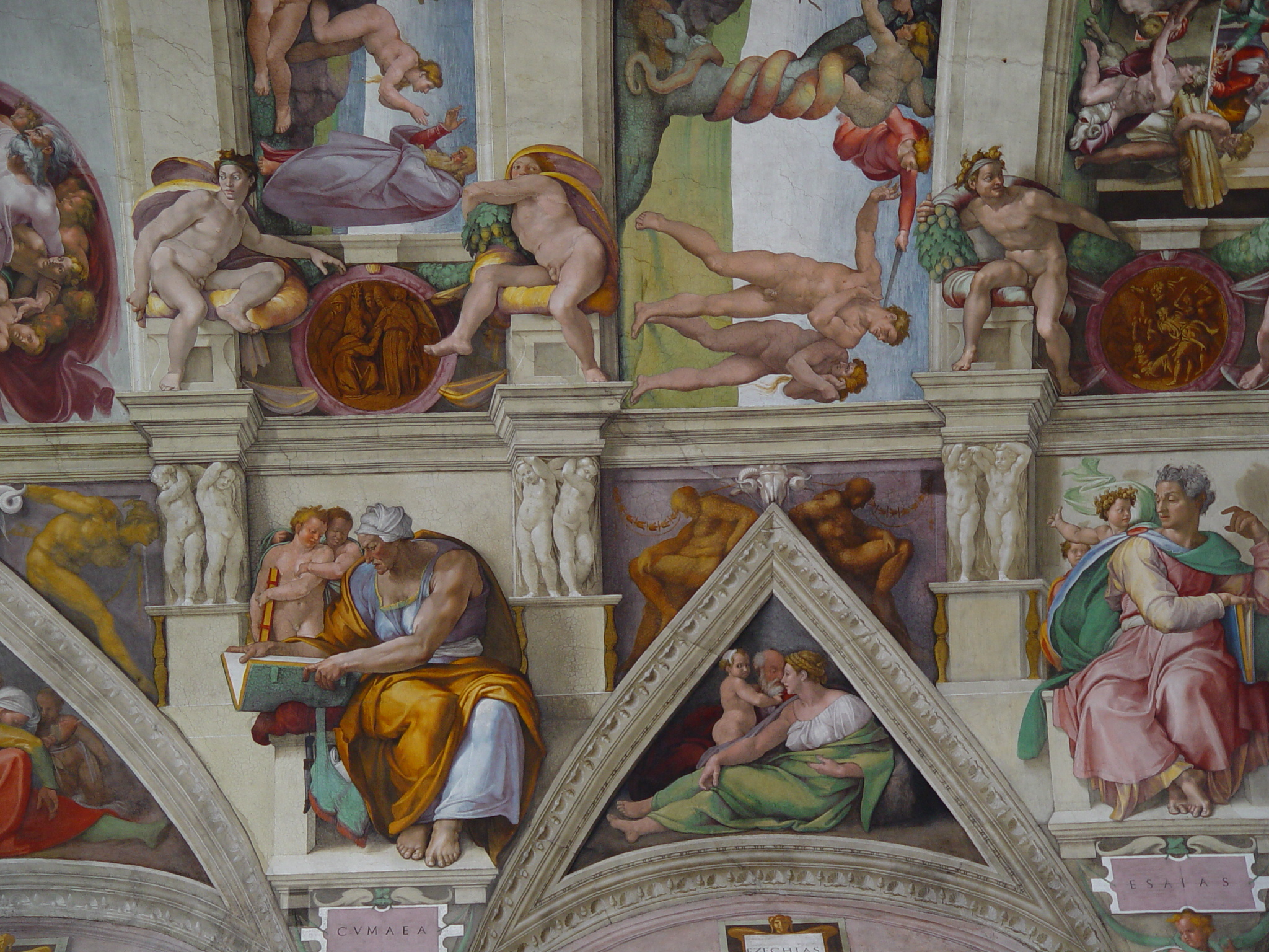 Sixtinische Kapelle, Detail zum einem Fresko